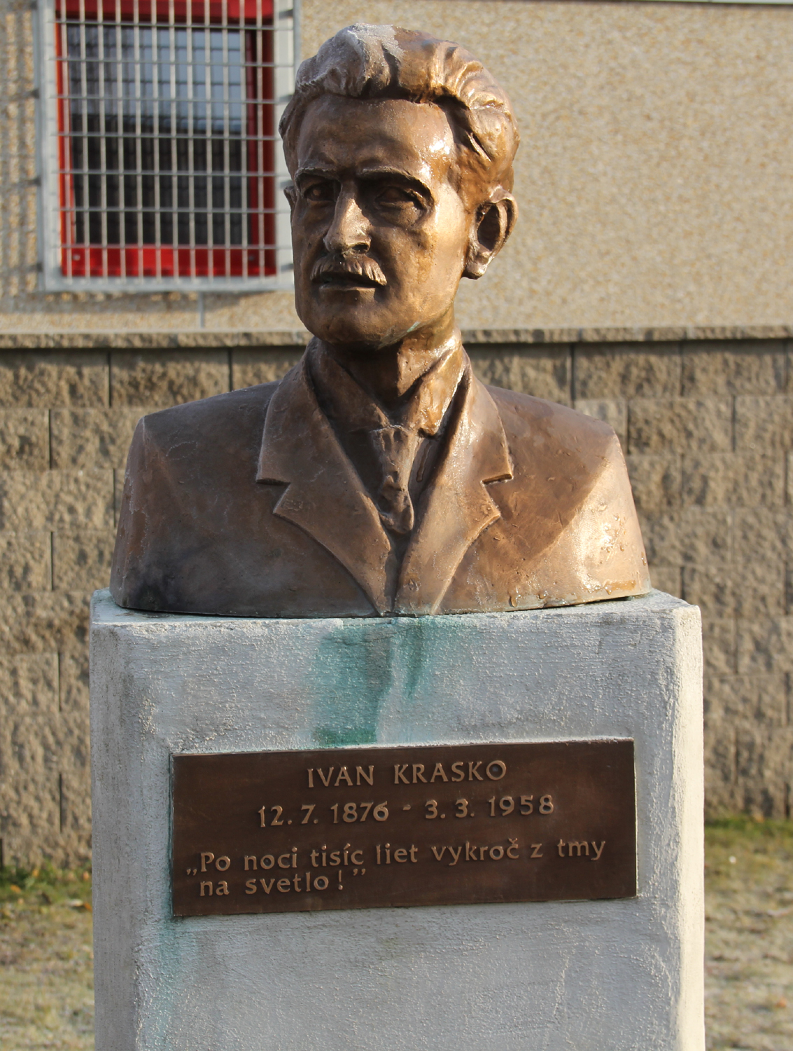 Bronzová busta slovenského básnika Ivana Kraska na Námestí Štefana Marka Daxnera v Rimavskej Sobote